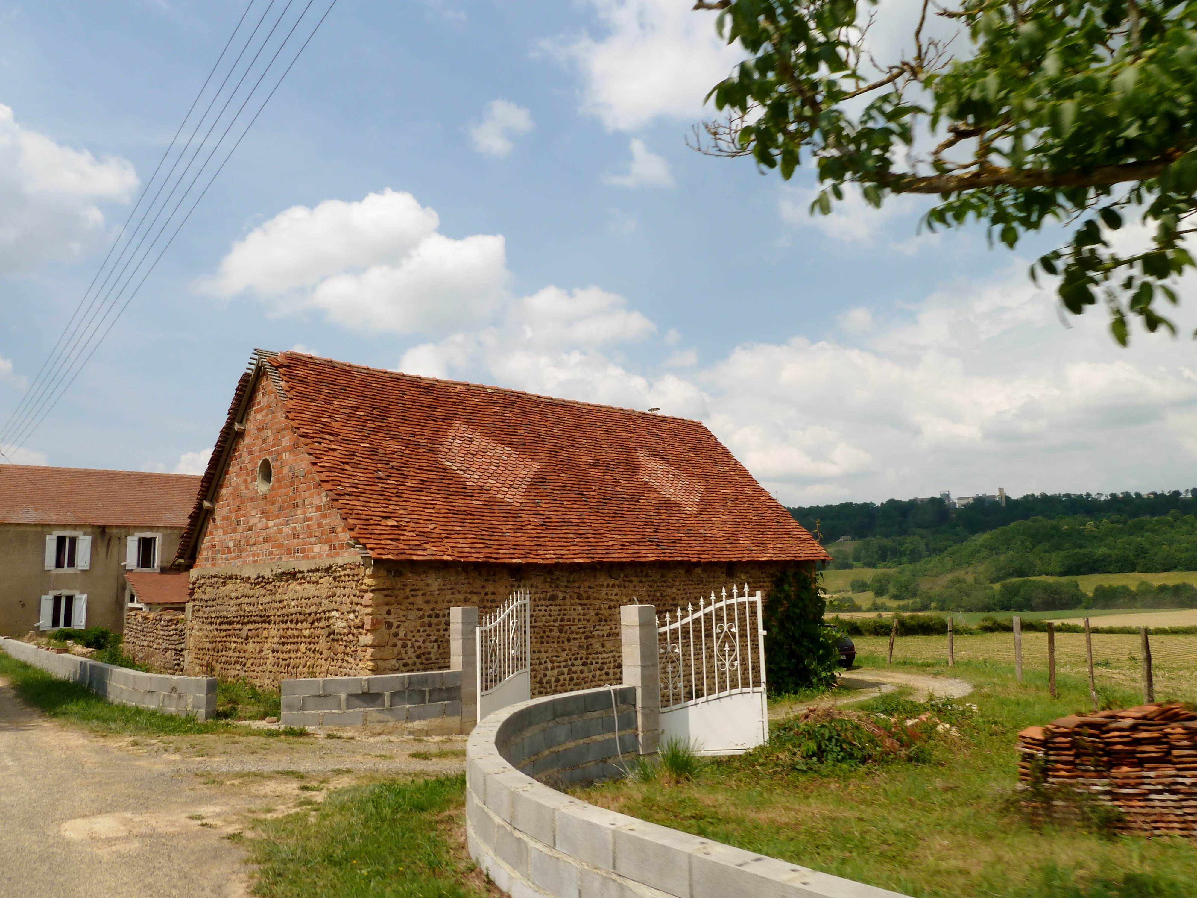 Une toiture de Peyrelongue-Abos